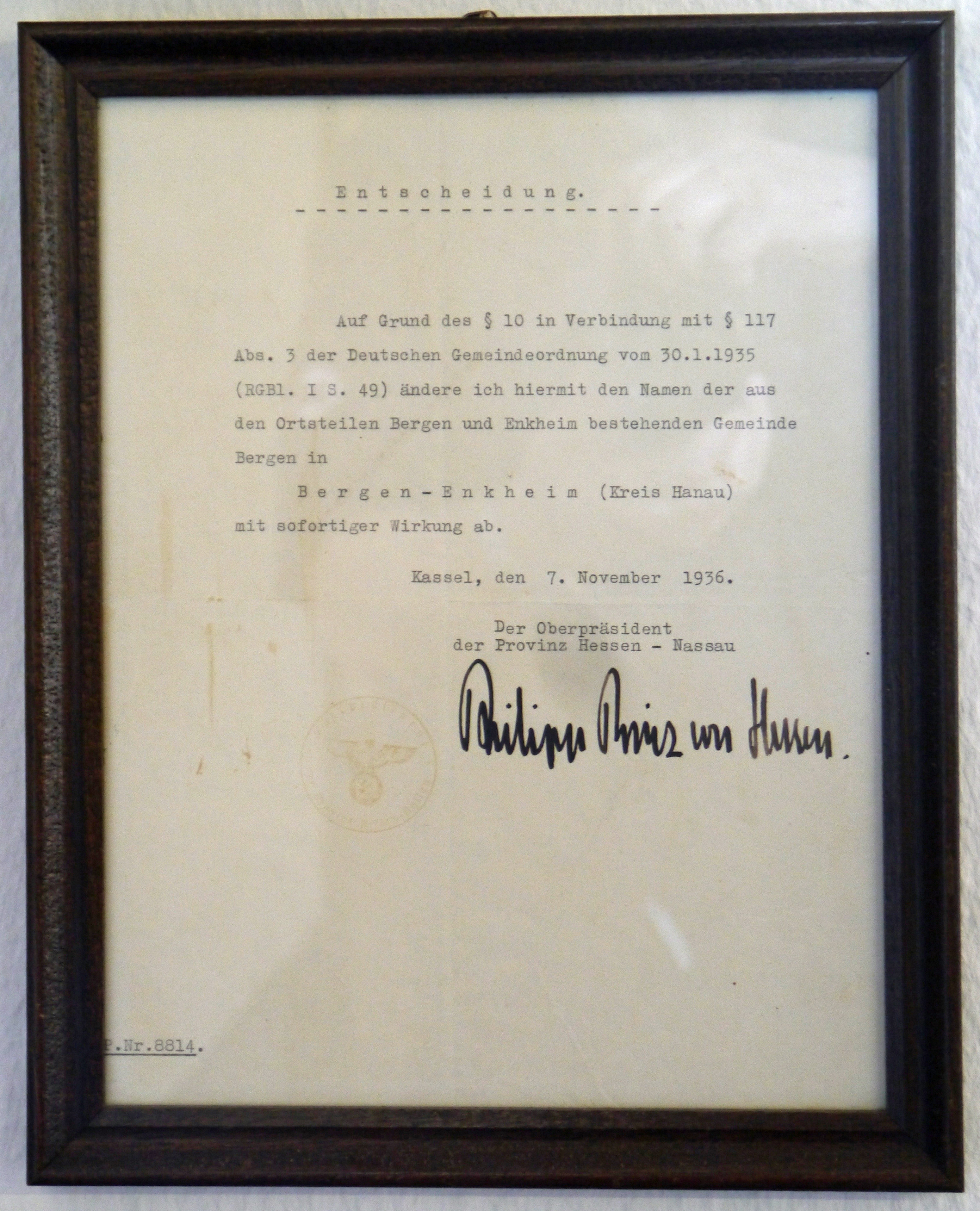 Amtliche Namensänderung, vom 7. November 1936 des Ortes Bergen, mit den Ortsteilen Bergen und Enkheim, in den Ort Bergen-Enkheim. Im Heimatmuseum in Bergen.